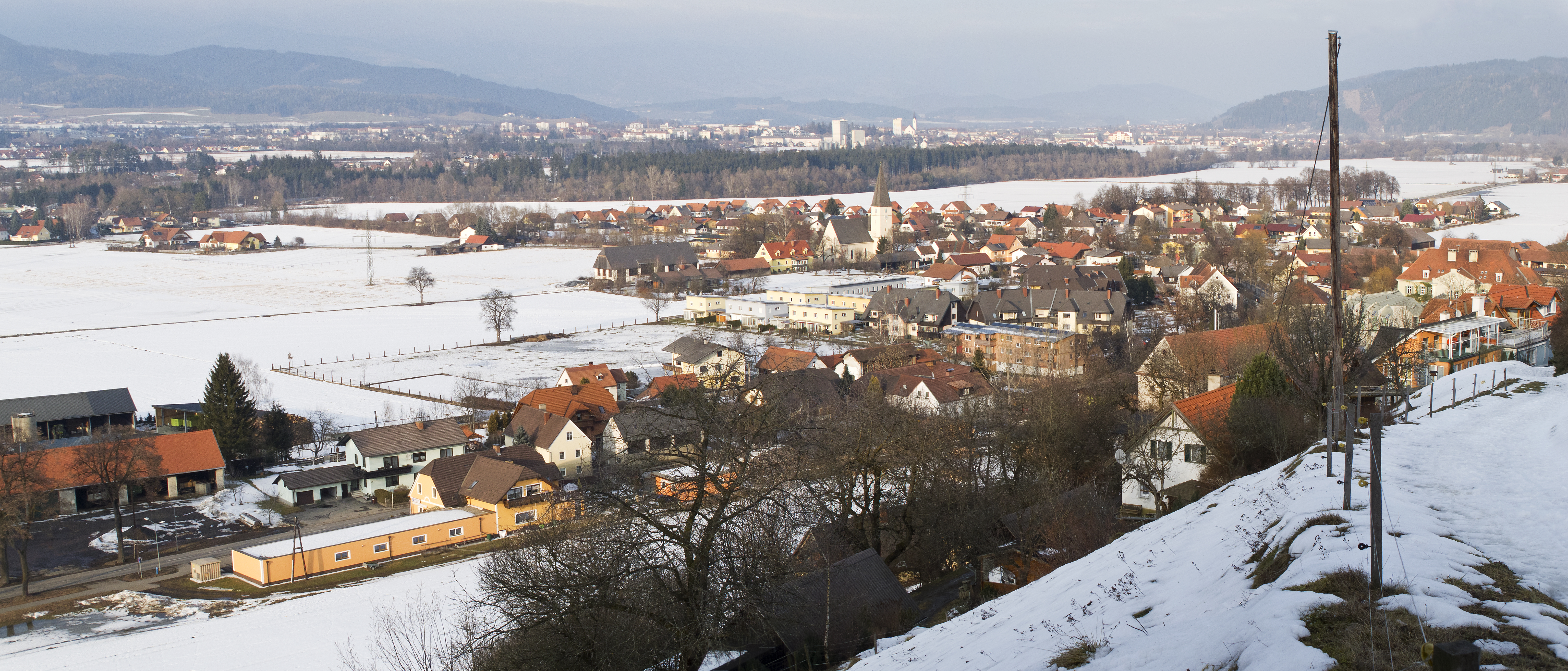 Großlobming von Südwest